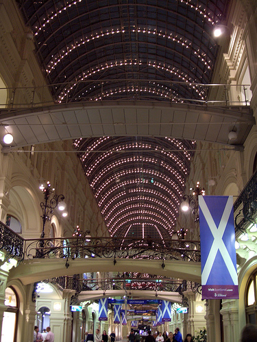 Moscow GUM